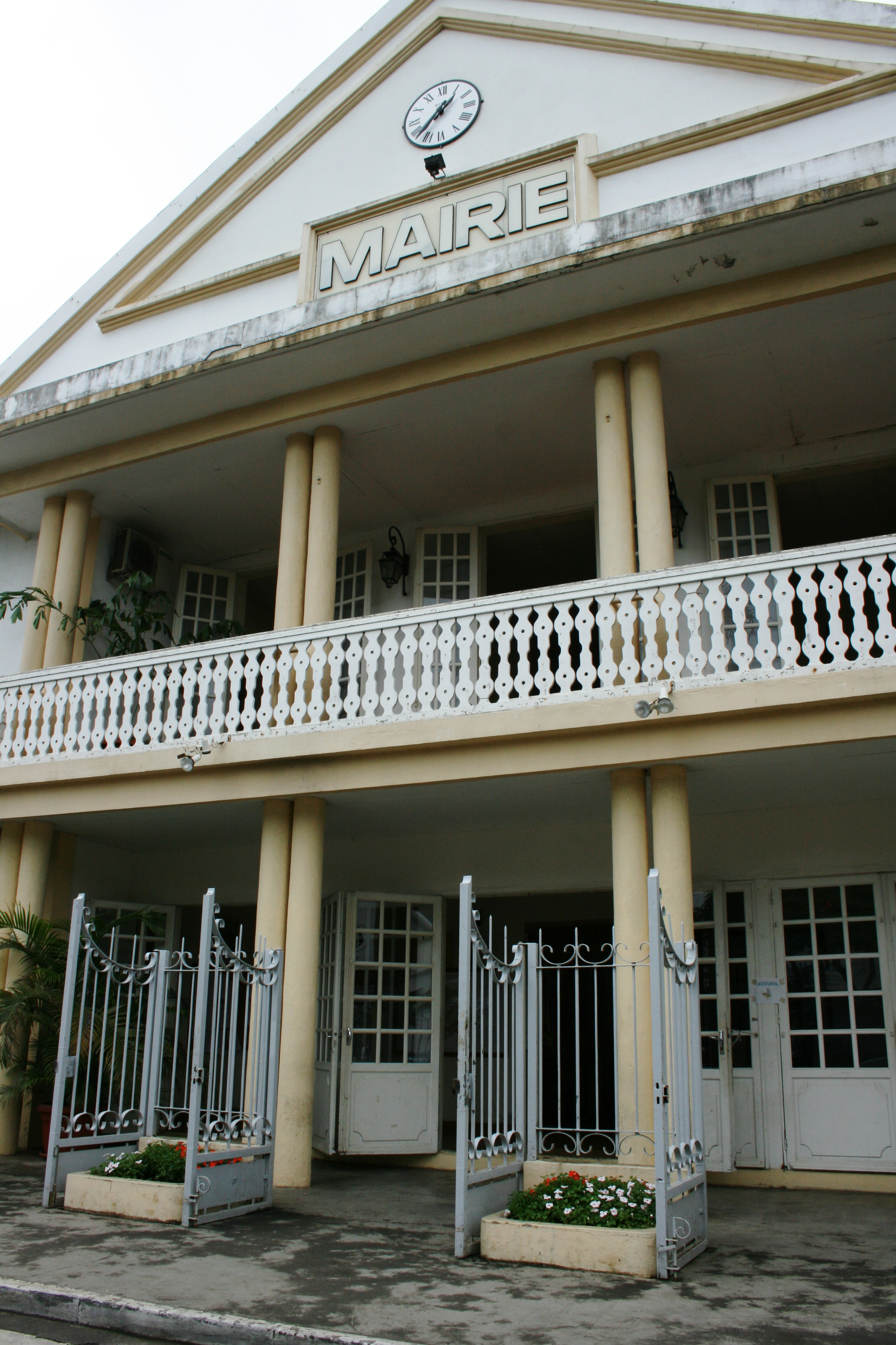 Vue de l'hôtel de ville de Sainte-Suzanne de La Réunion.